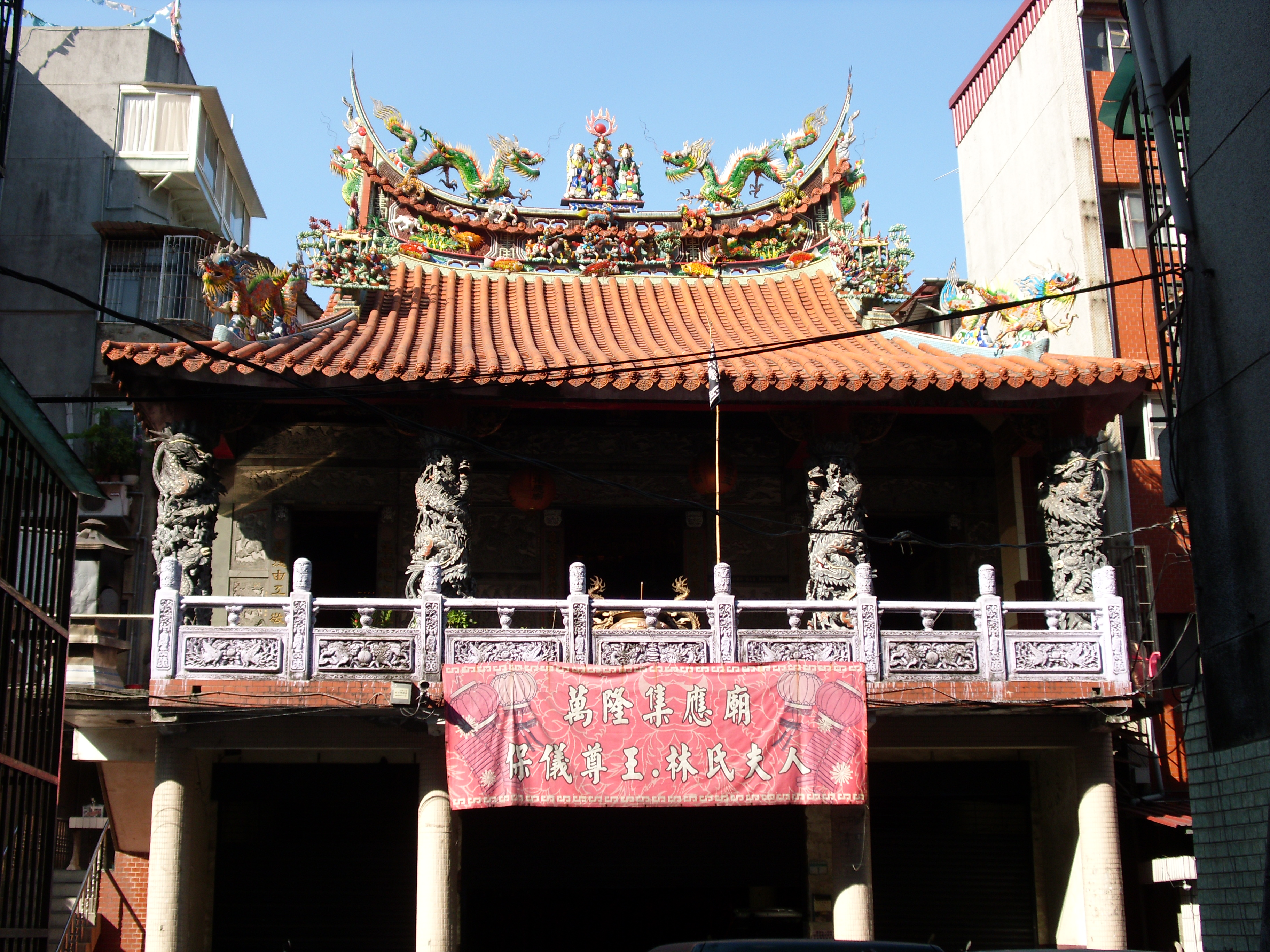 Bân-lâm-gú: 萬隆集應廟，佇臺北市。